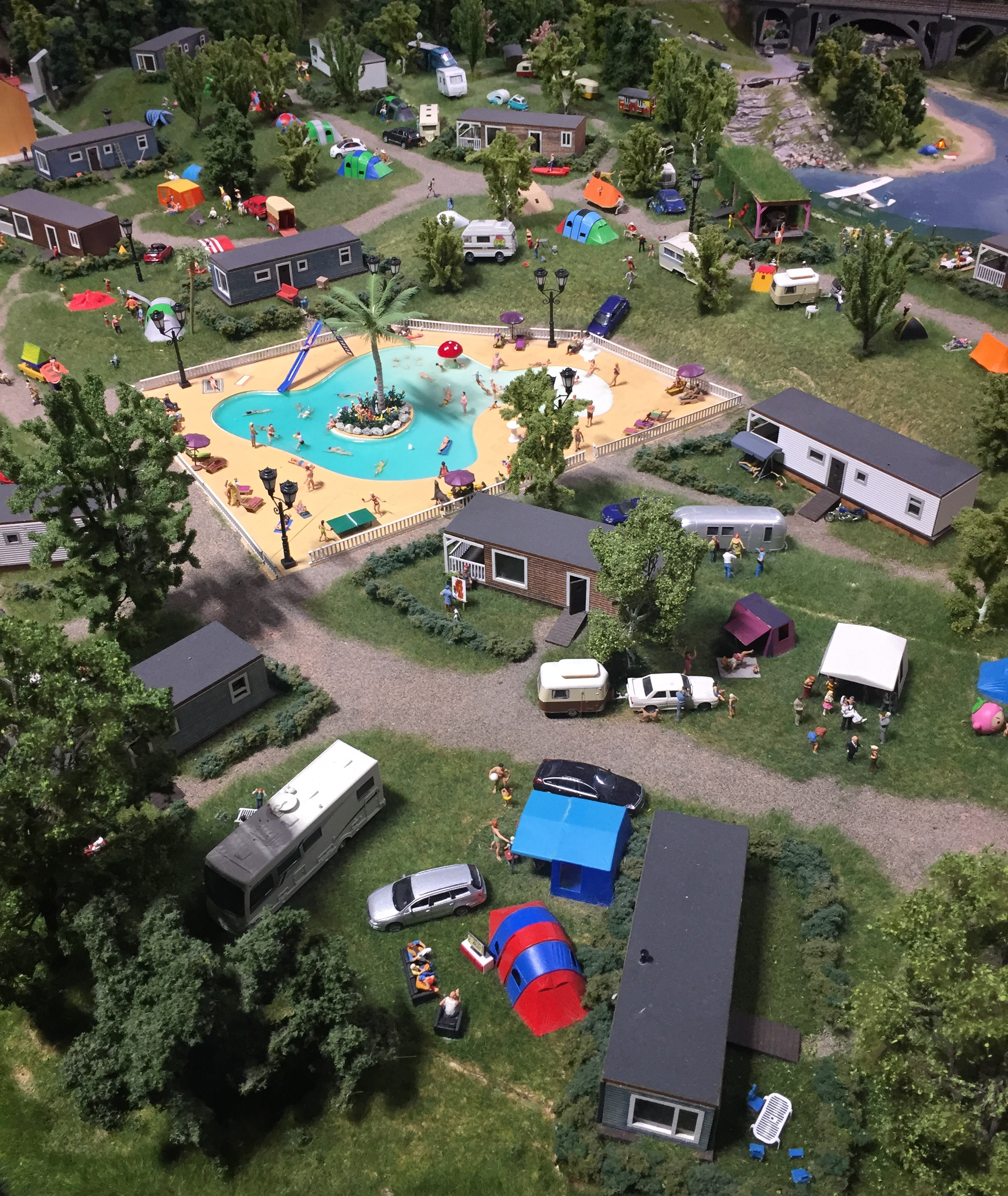 Mini World Lyon.